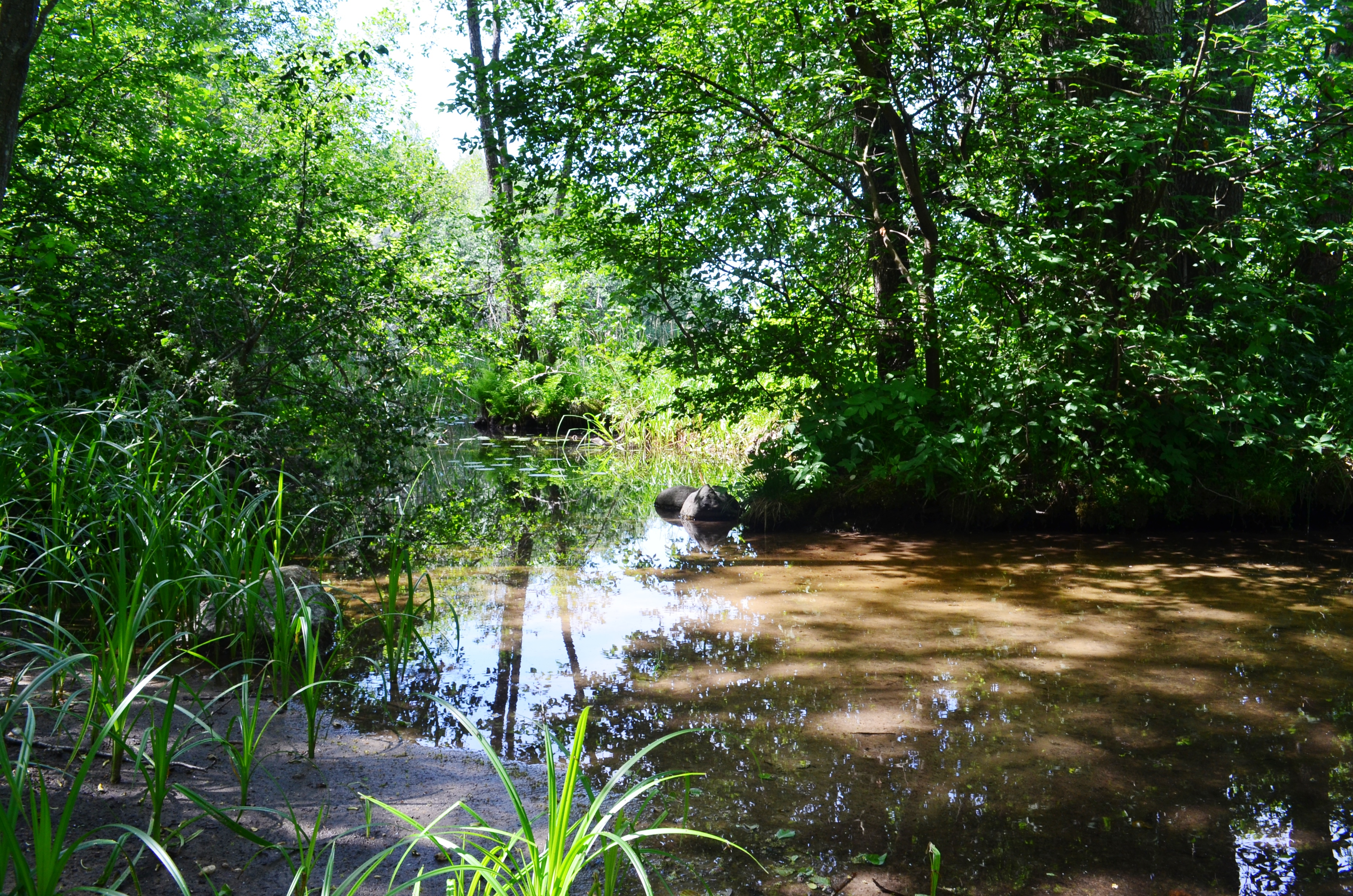 Upelis, ištekantis iš Viranglio ežero į Asveją, Jonėnai, Vilniaus r.